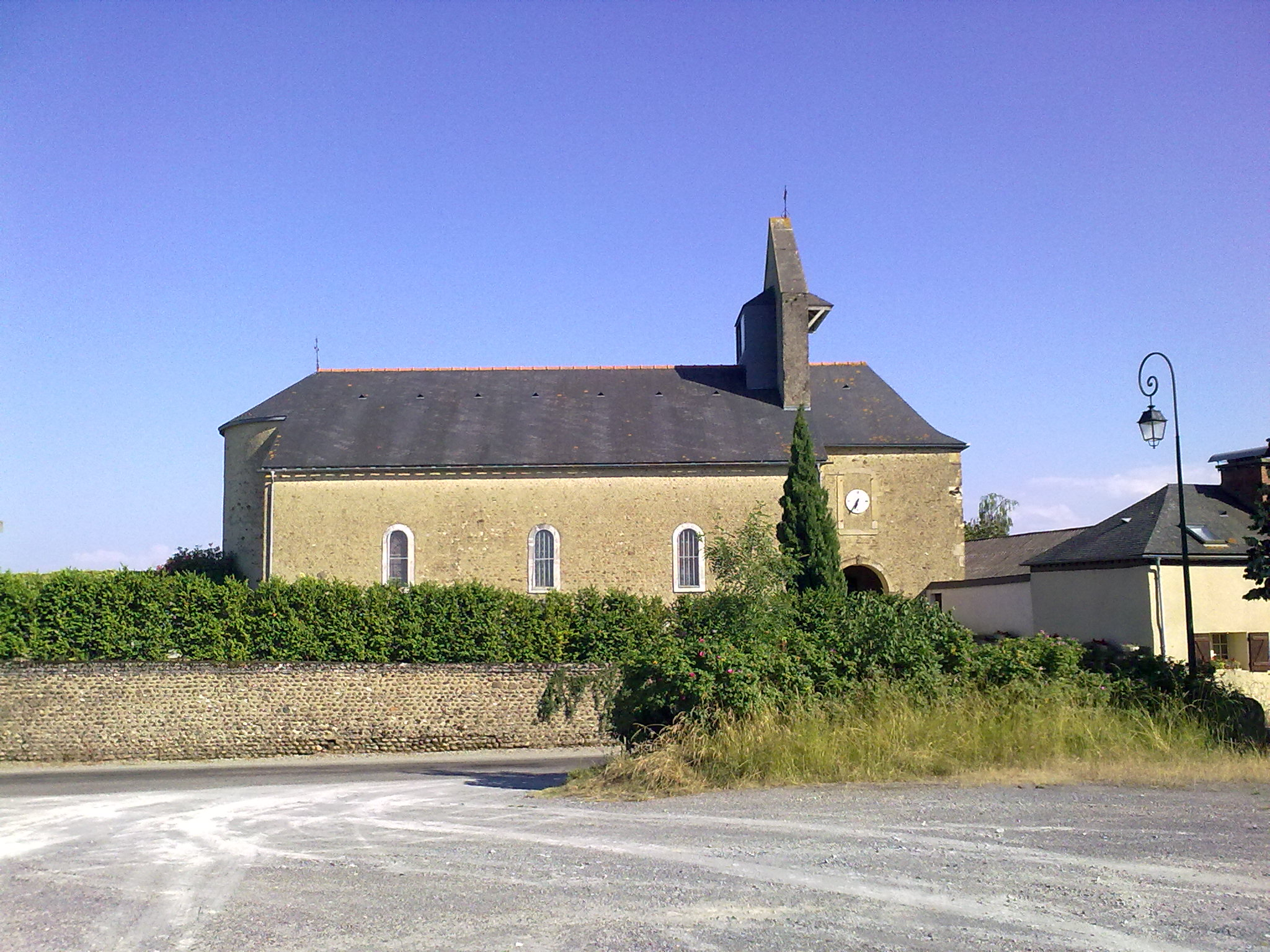 Église d'Escoubès.